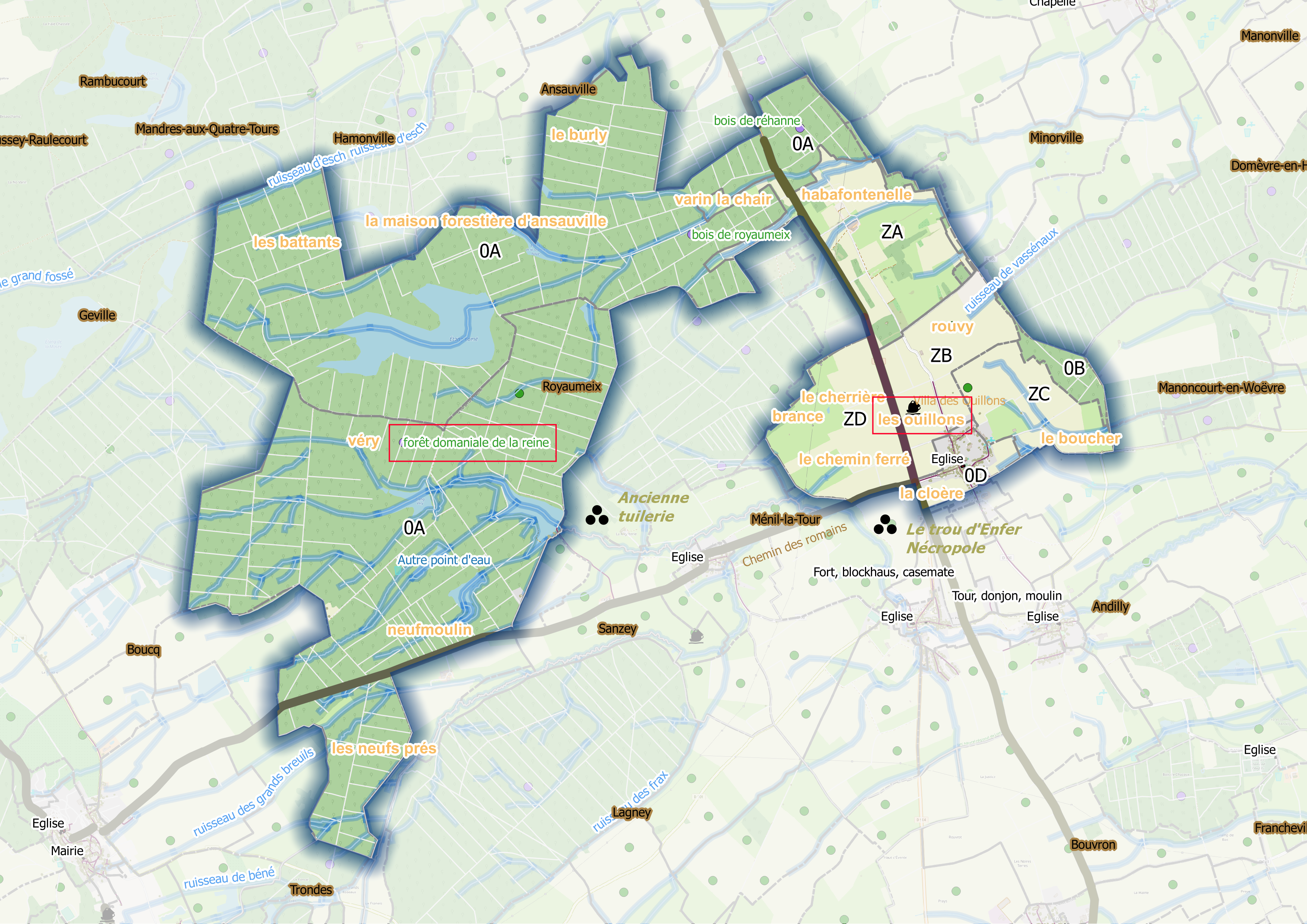 Fig1 .Royaumeix (Ban communal)